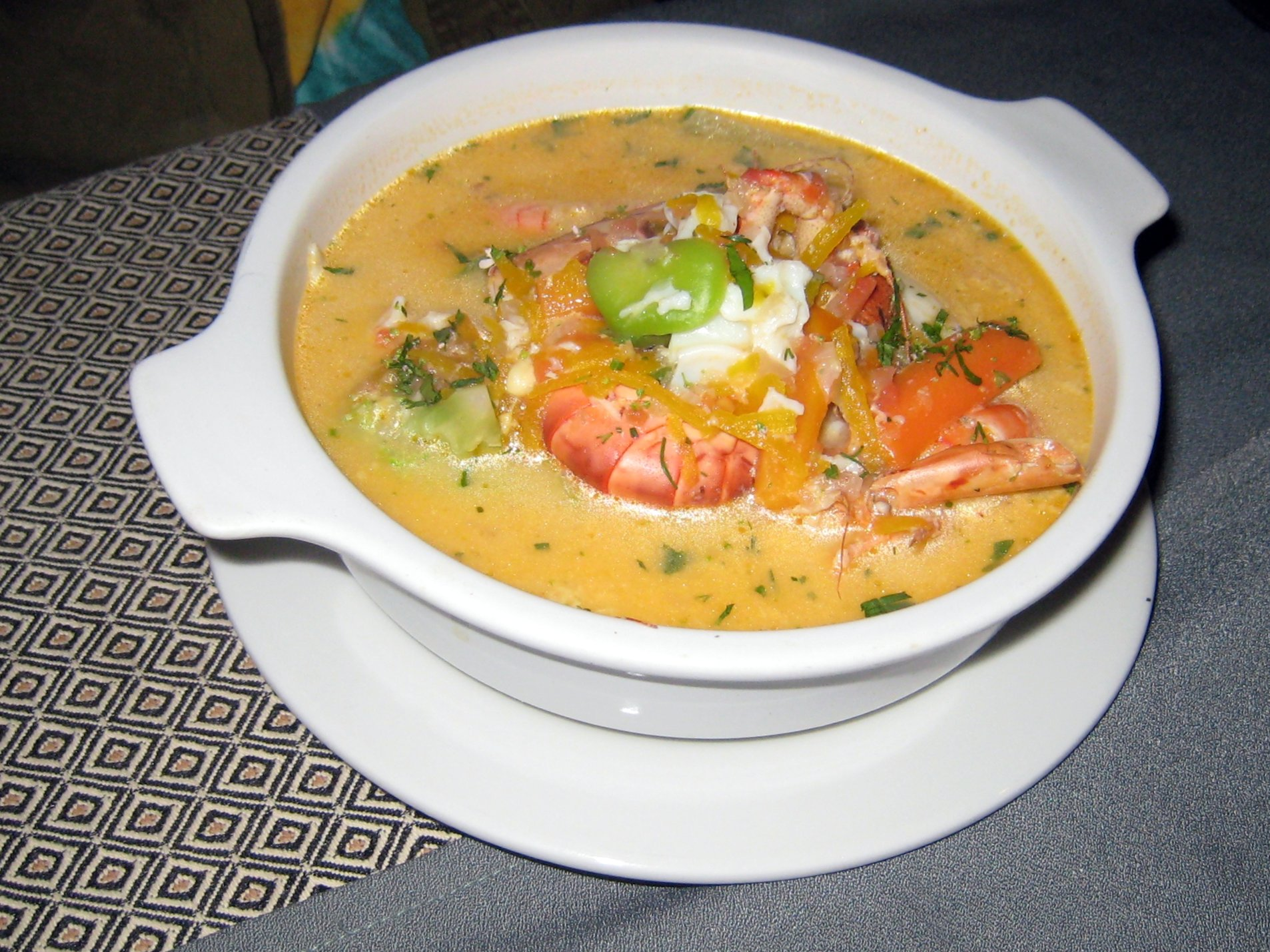 Chupe de Camarones. Fotografía tomanda en Cusco, Perú.